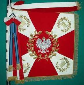 Sztandar Pułku Ochrony